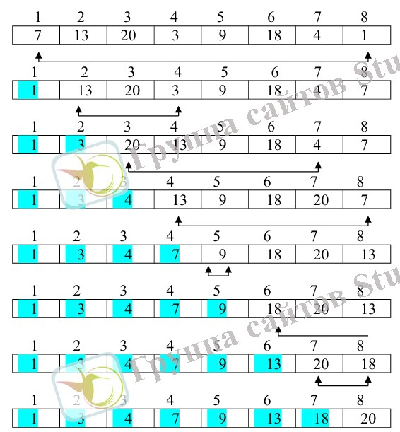 Қазақша (кирил): Таңдау арқылы сұрыптау